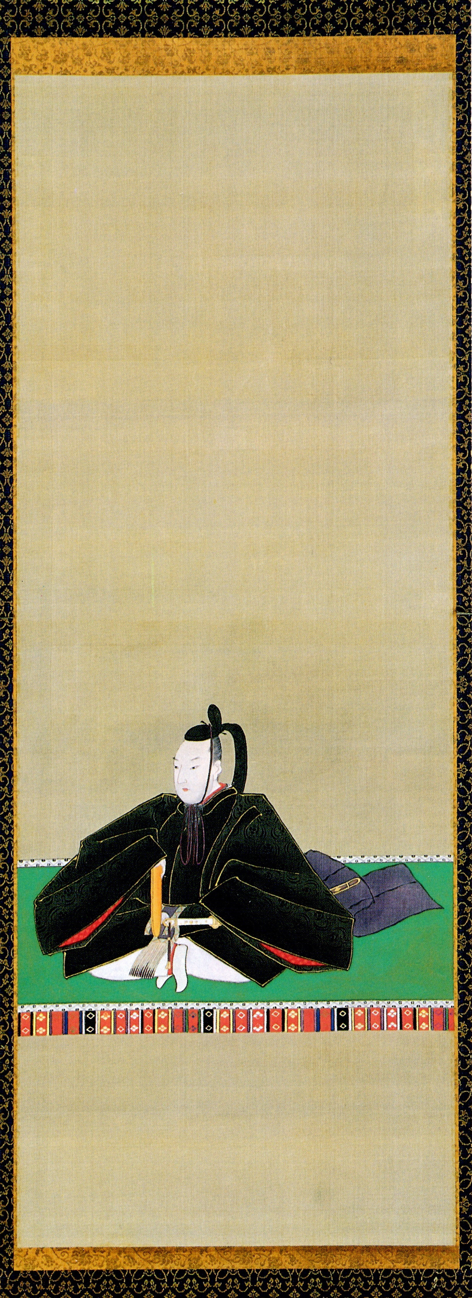 南部利敬の肖像。